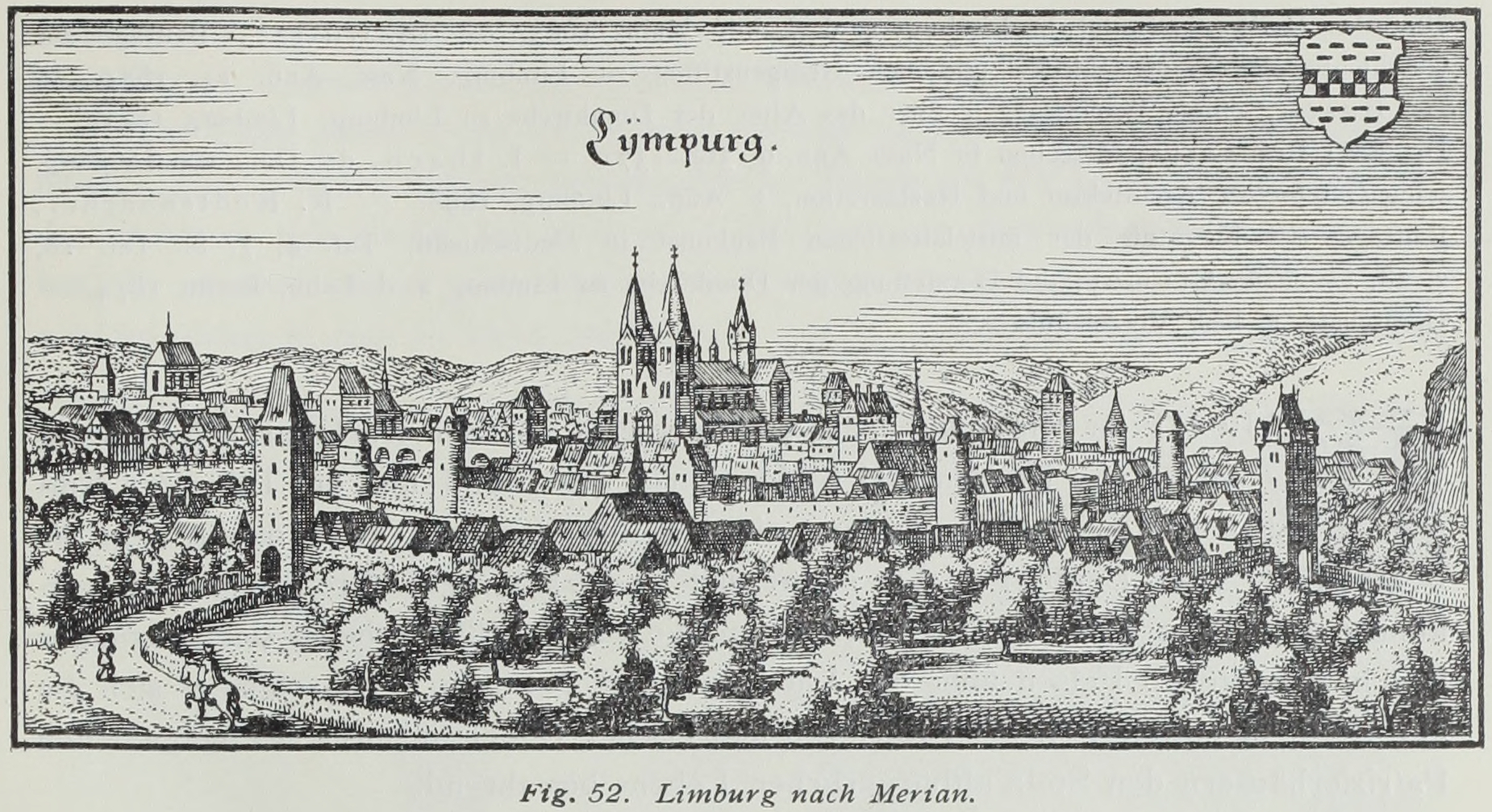 Limburg nach Merian